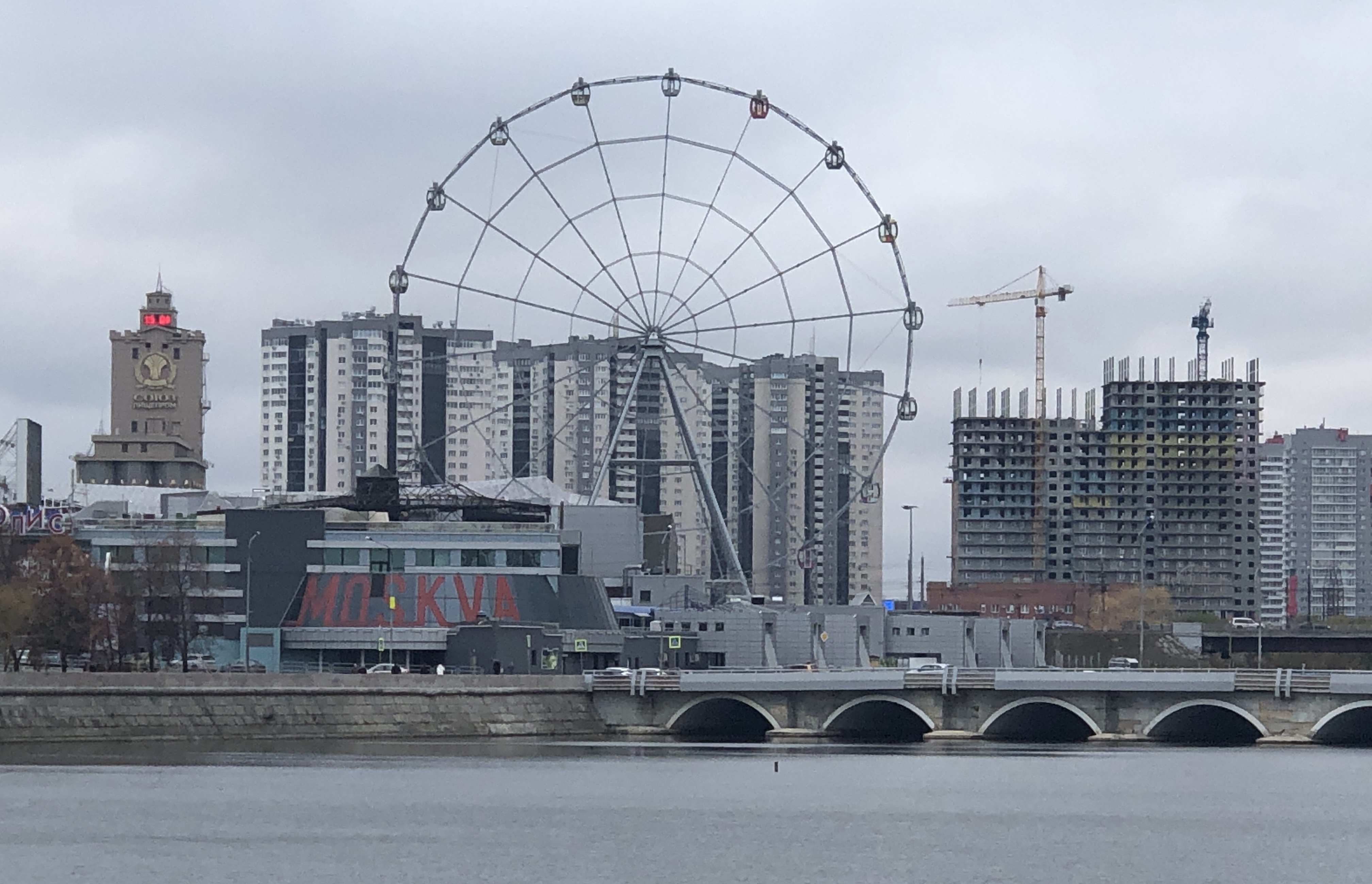 Центр Челябинска